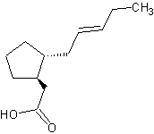 Химическая формула жирной карболовой кислоты